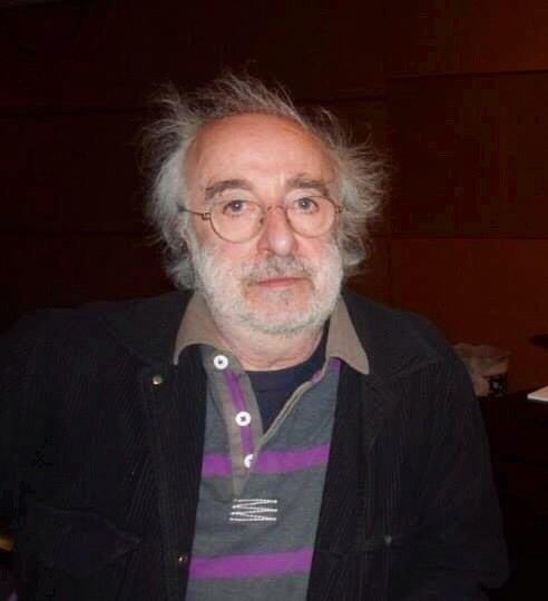 Jan De Wilde.